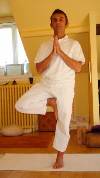 Yoga postures Bhagaritasana.intro.